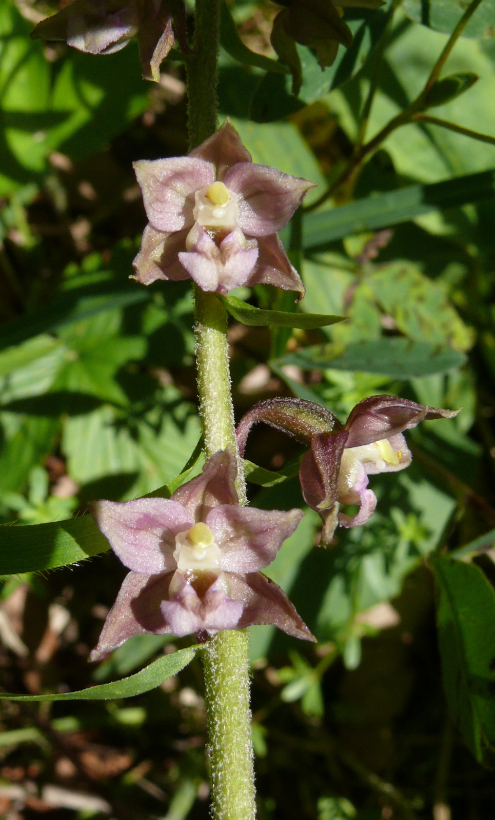 Epipactis × schmalhausenii (Ep. atrorubens × helleborine) Härtsfeld, Germany